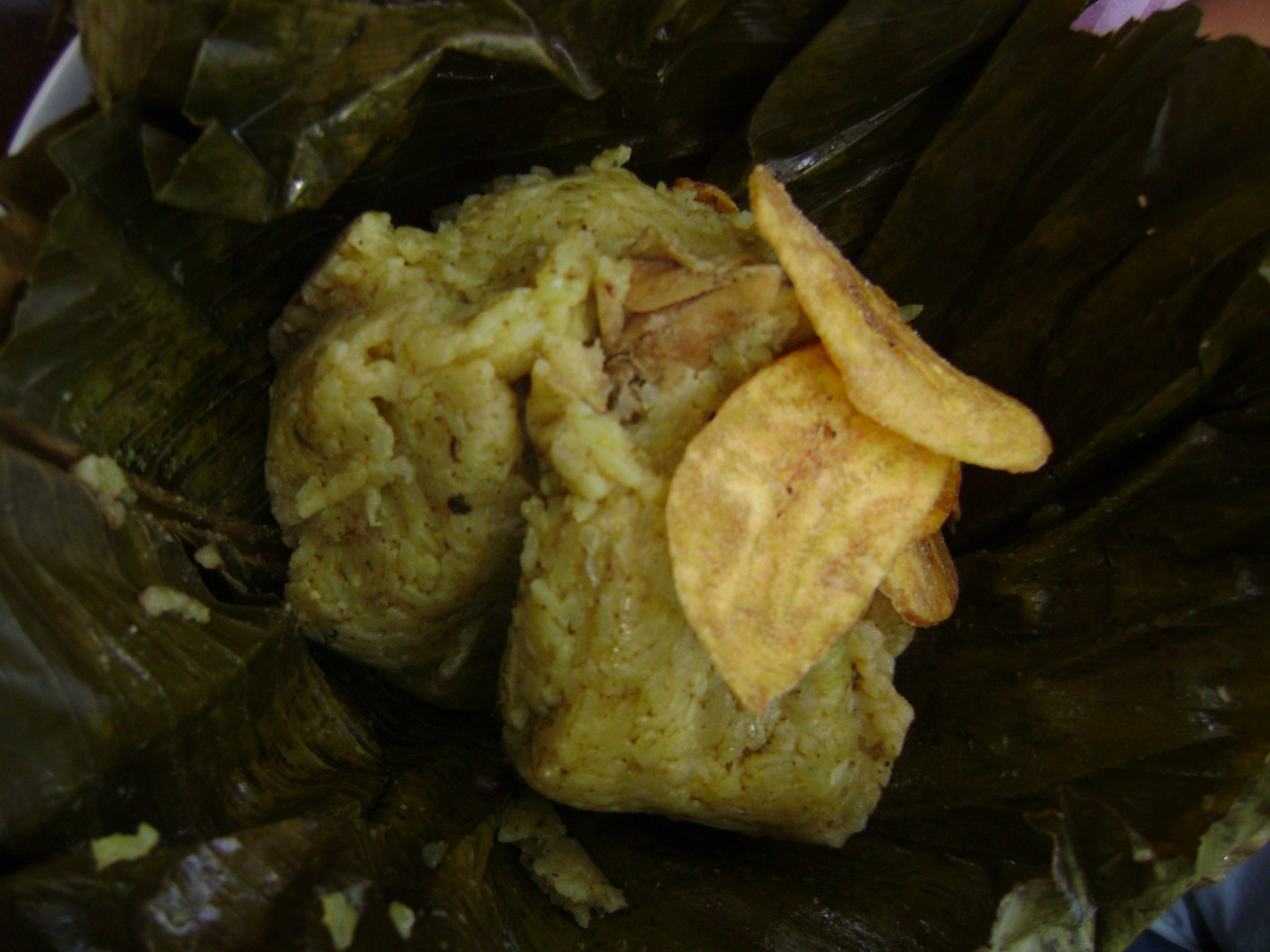 Juane